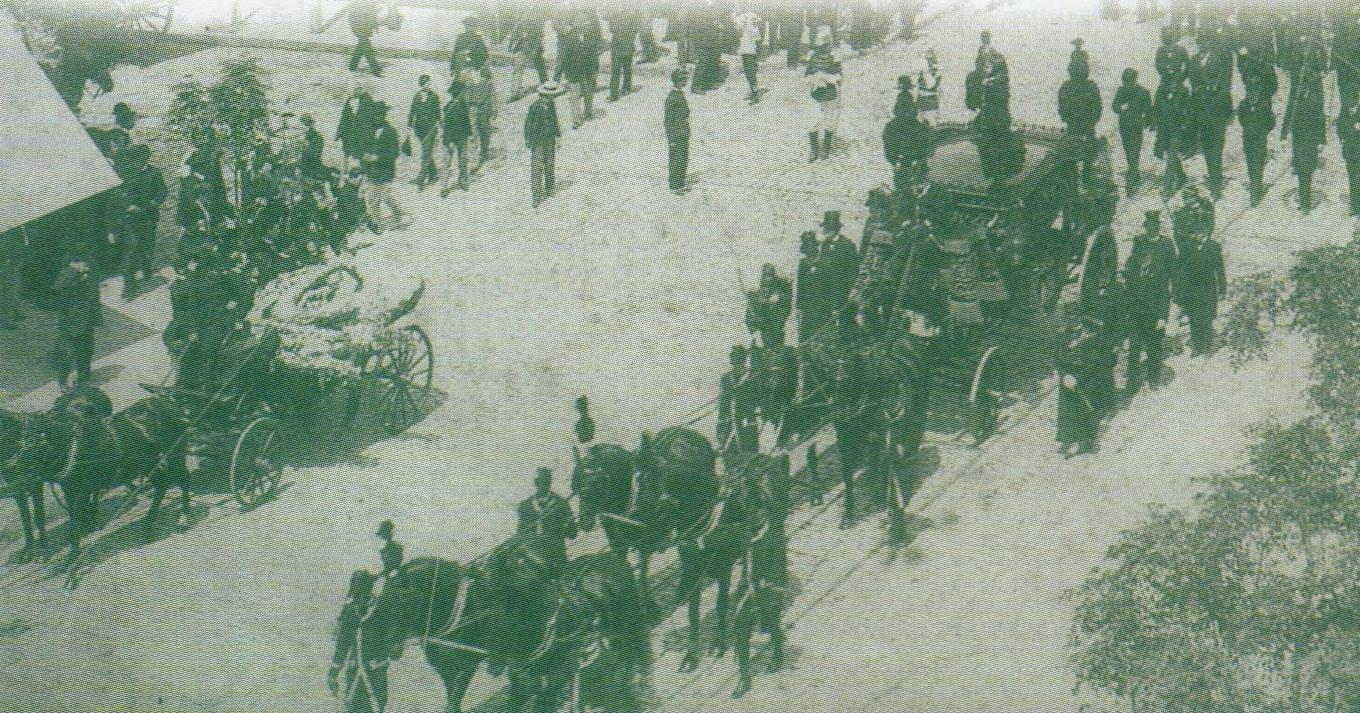 Sección de una fotografía de John Fitz-Patrick que muestra el sepelio del fallecido Presidente de Uruguay Juan Idiarte Borda, cuyo asesinato se efectuó el 25 de agosto de 1897.